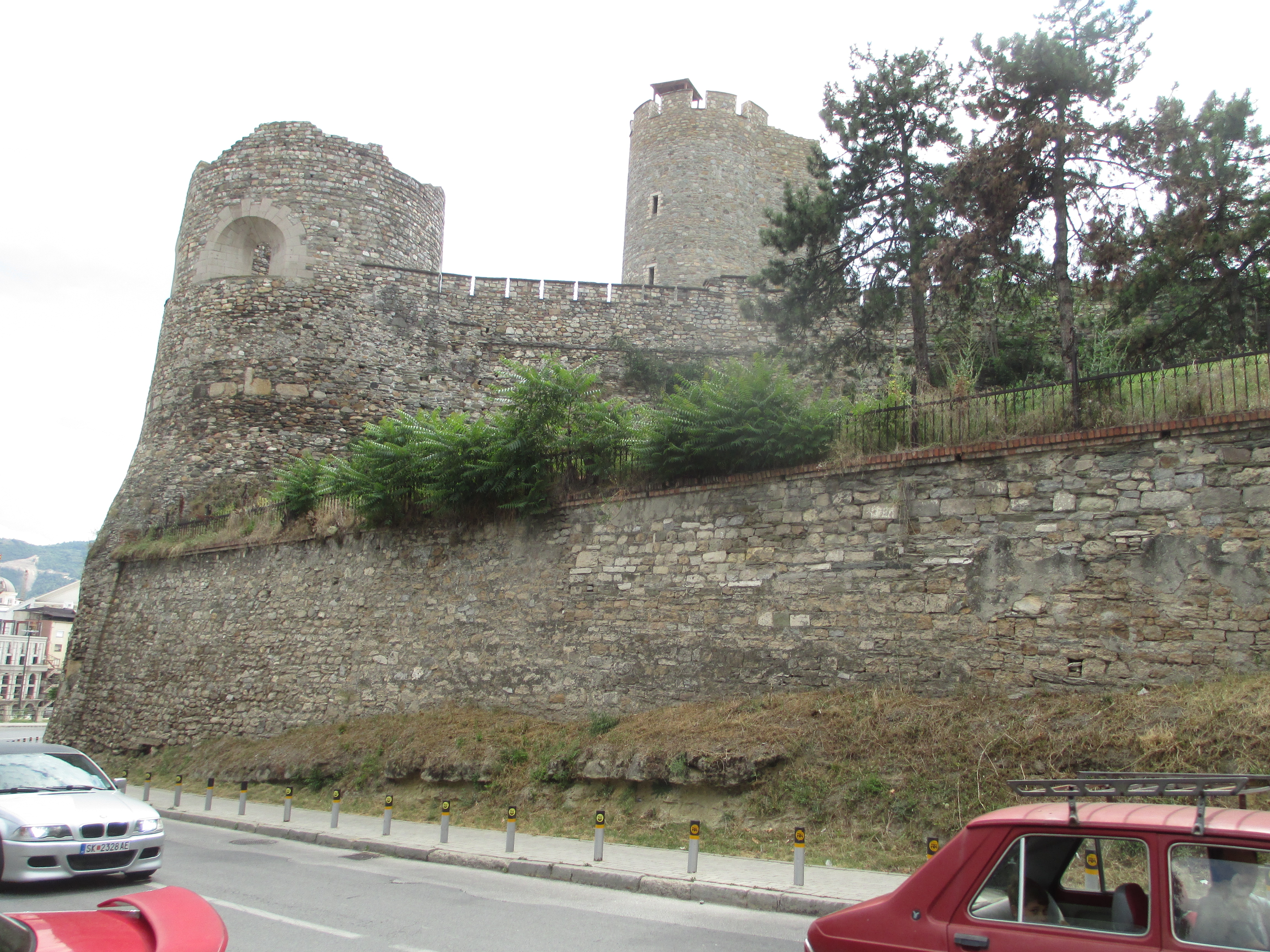 מבצר סקופיה